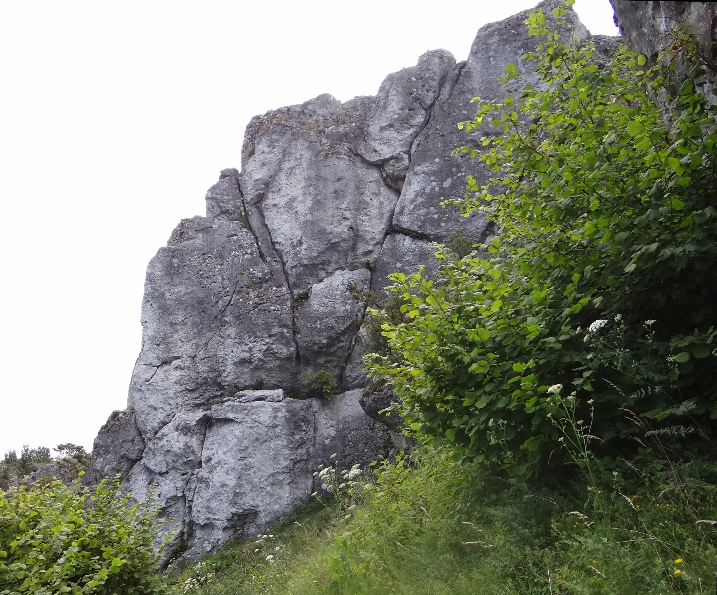 Chomicza skała na Gorze Zborów w Podlesicach